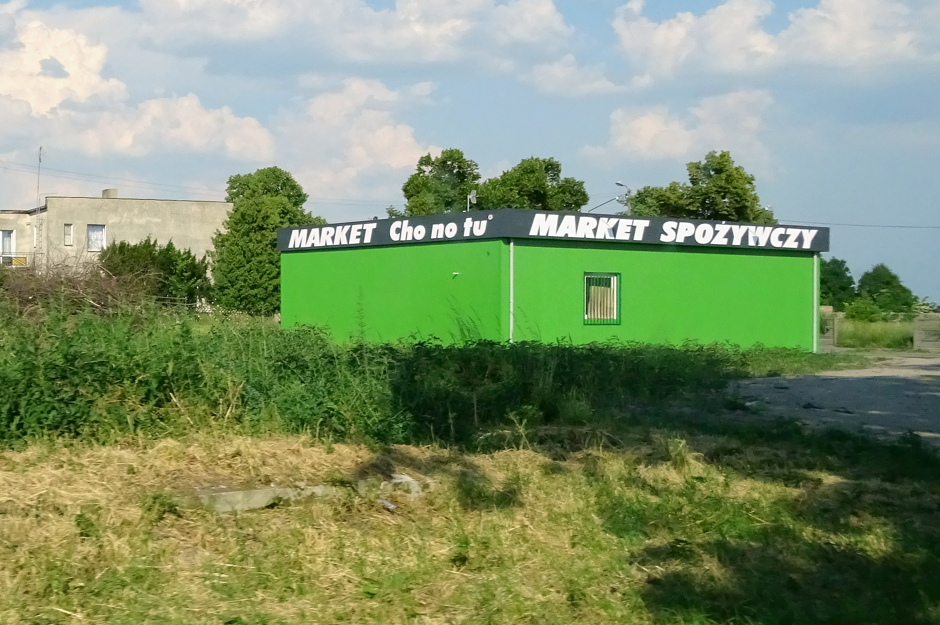 Wielkopolska. Na bazie sklepów GS powstaje sieć małych sklepów spożywczych "Cho no tu". Sieć ta cieszy się coraz większą popularnością.